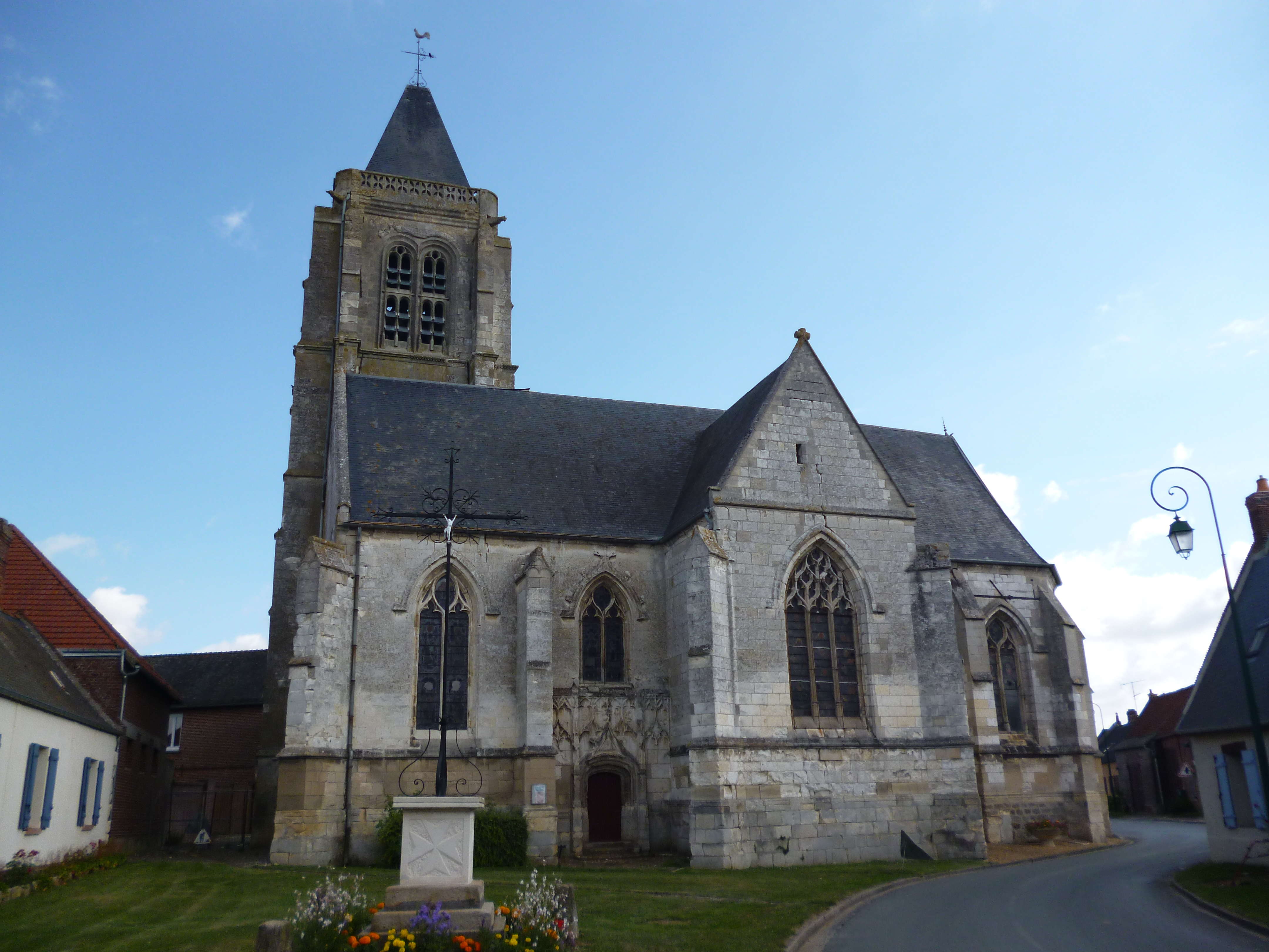 Eglise Saint-Michel de Brunvillers-la-Motte (Oise, 60, Picardie), Classé 1922